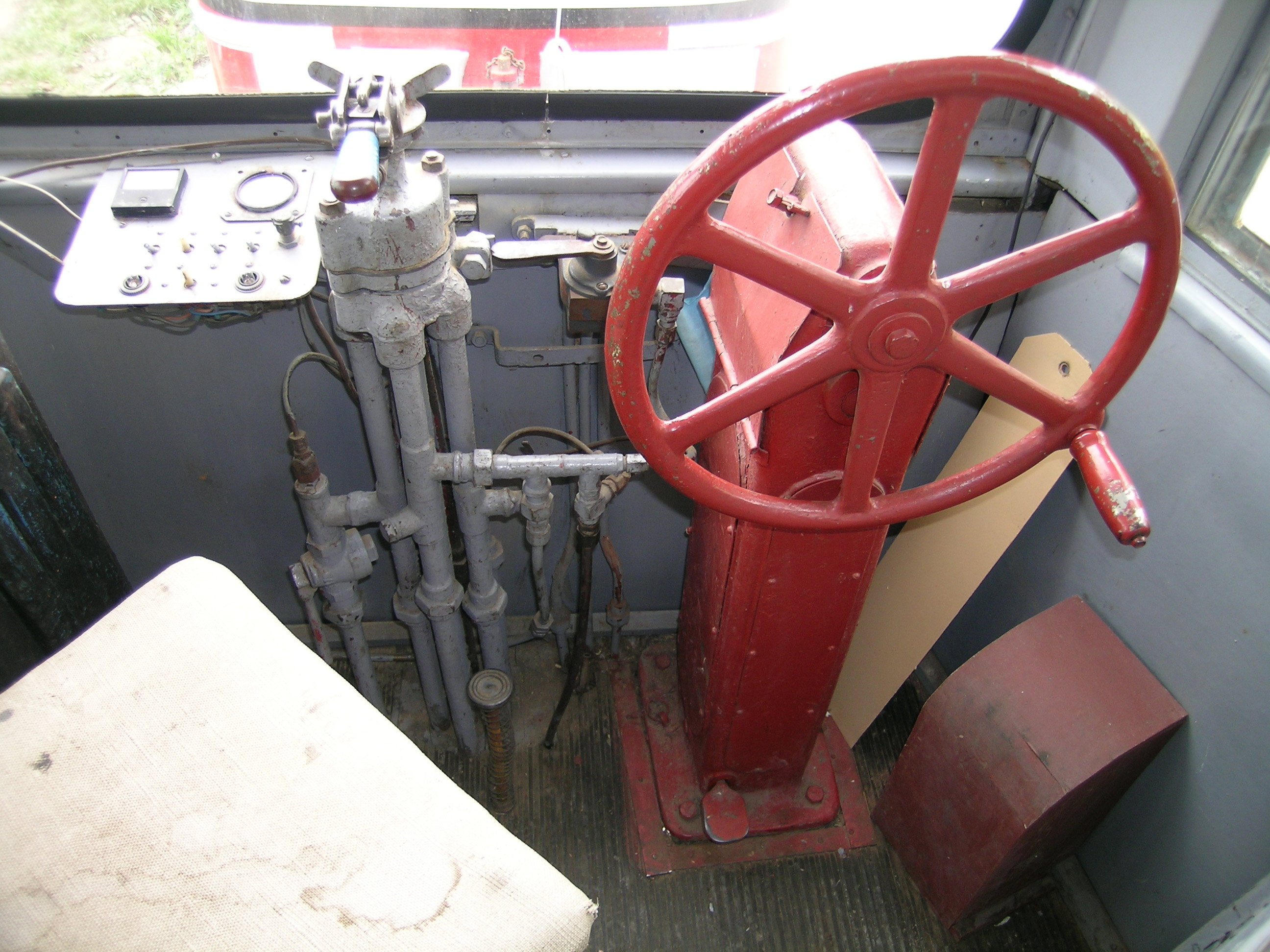 Интерьер кабины водителя трамвайного вагона ЛМ-49. Куст управления пневмосистемой и колонка ручного тормоза